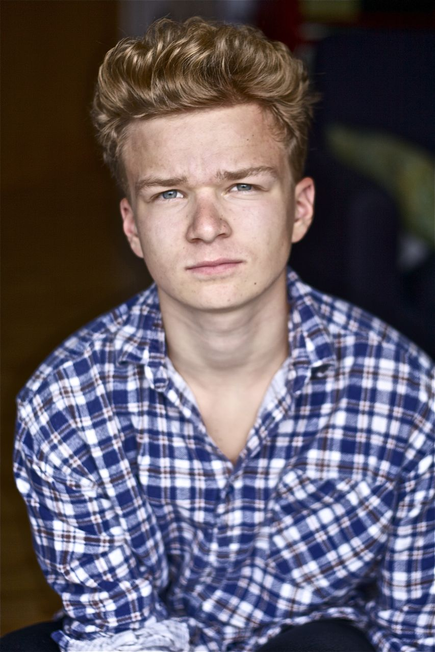 Karl Alexander Seidel 2011